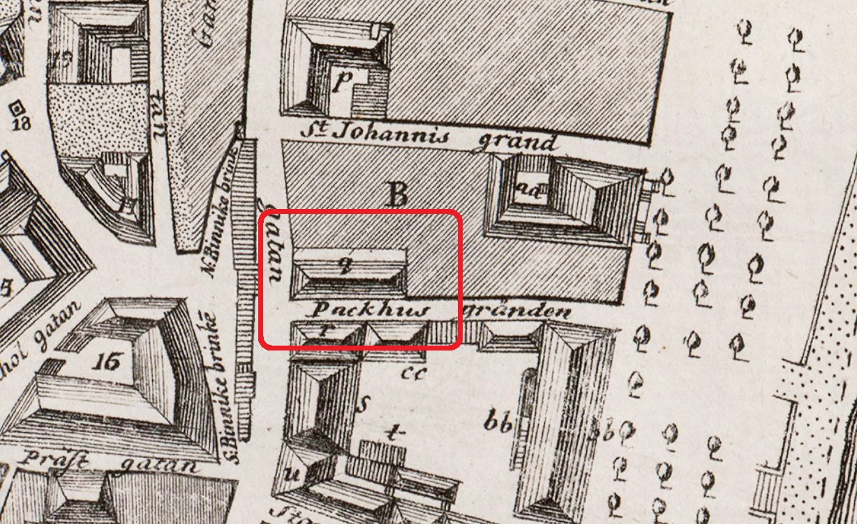 Del av 1771 års karta över Gamla Stan visande Källaren Stjärnan, Österlånggatan 45.